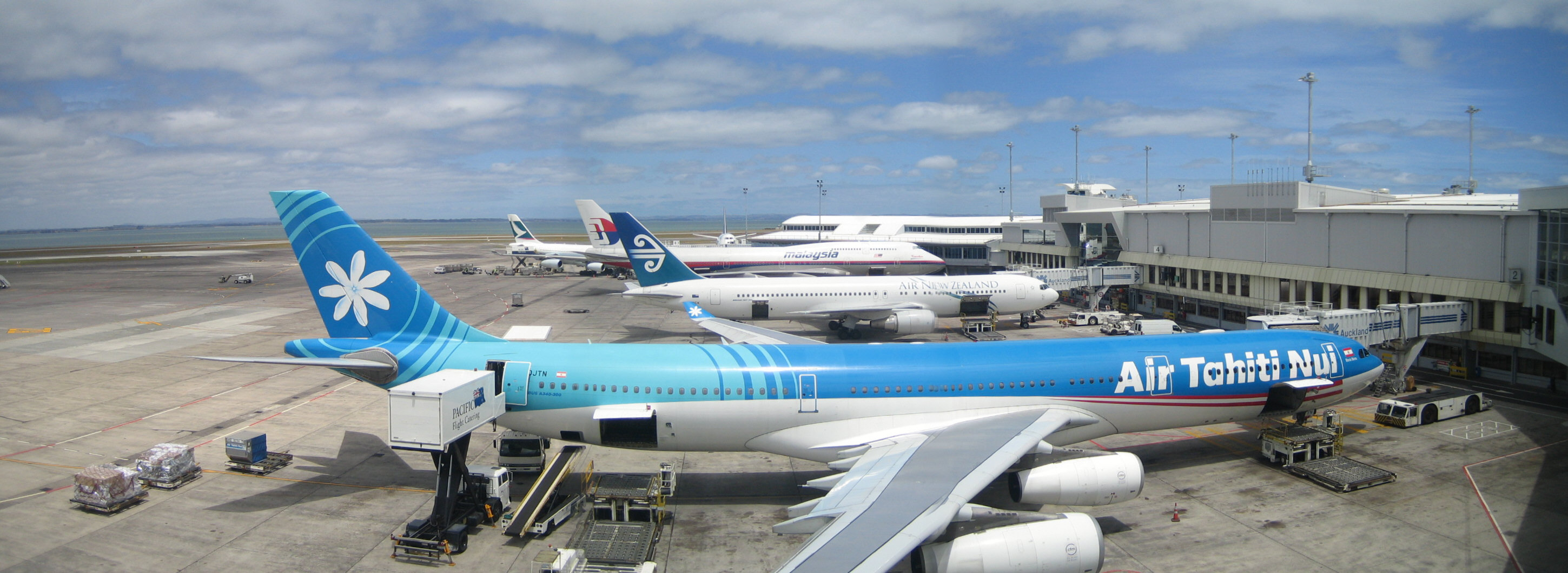 (Photo personnel 2006) Utilisateur:FRED